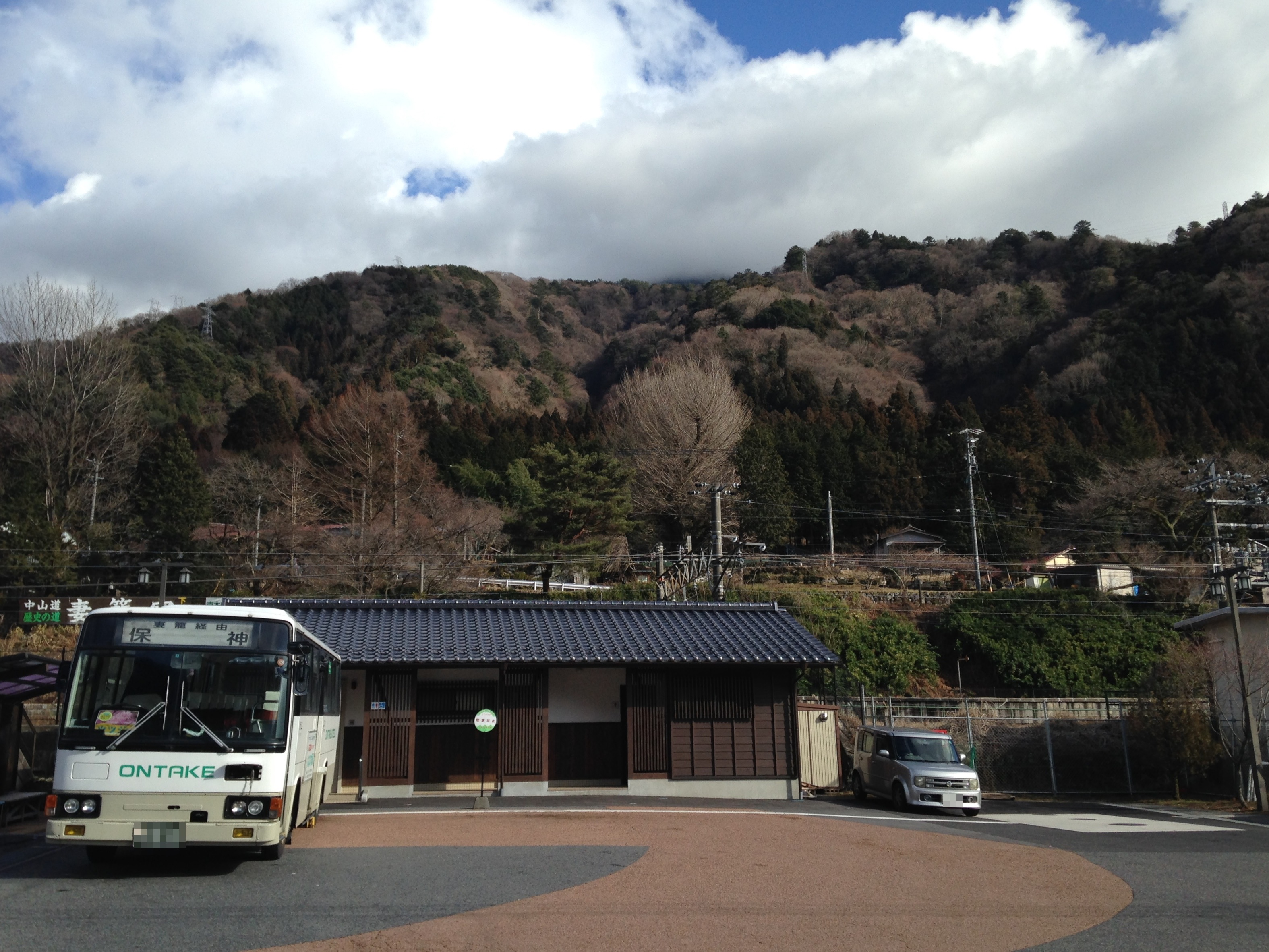 南木曽駅前バスターミナル